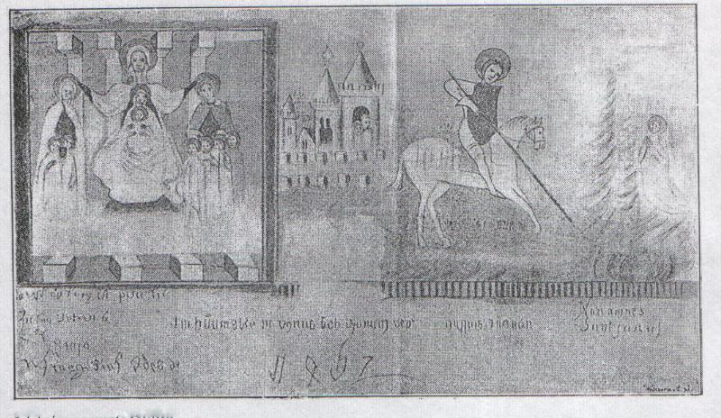 A feketegyarmati református templom belső tatarozásakor 1862-ben előkerült freskórészlet.